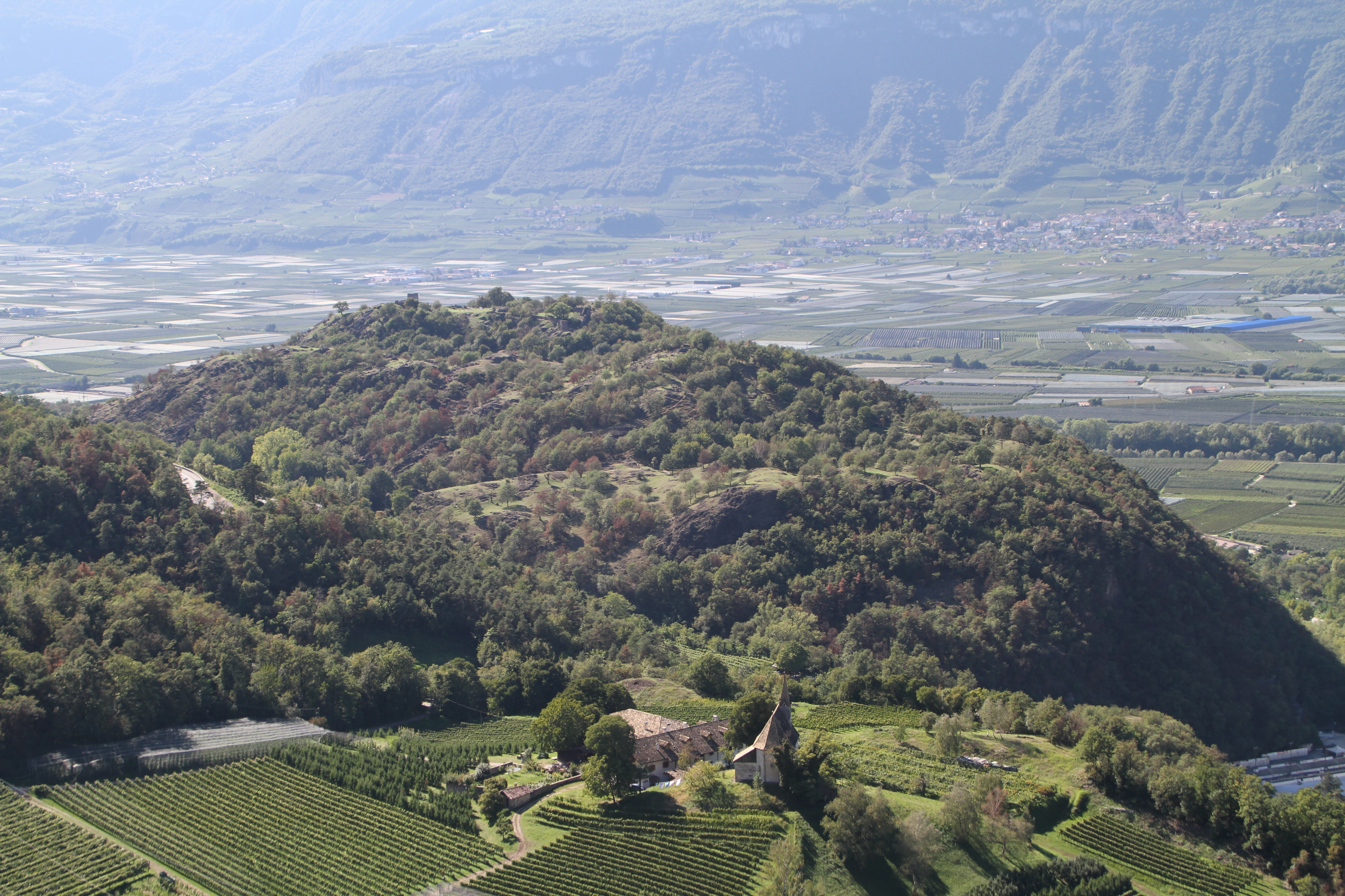 Castelfeder von der Montaner Kehre aus